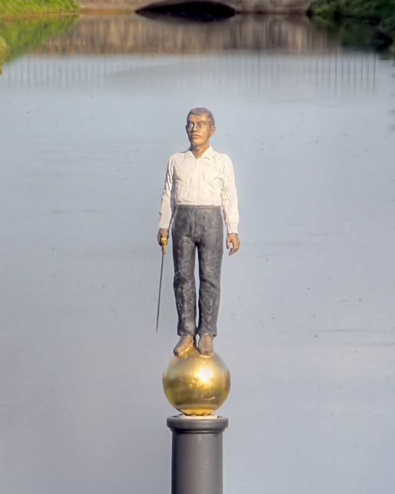 Skulptur „Neuer Eiserner Mann“